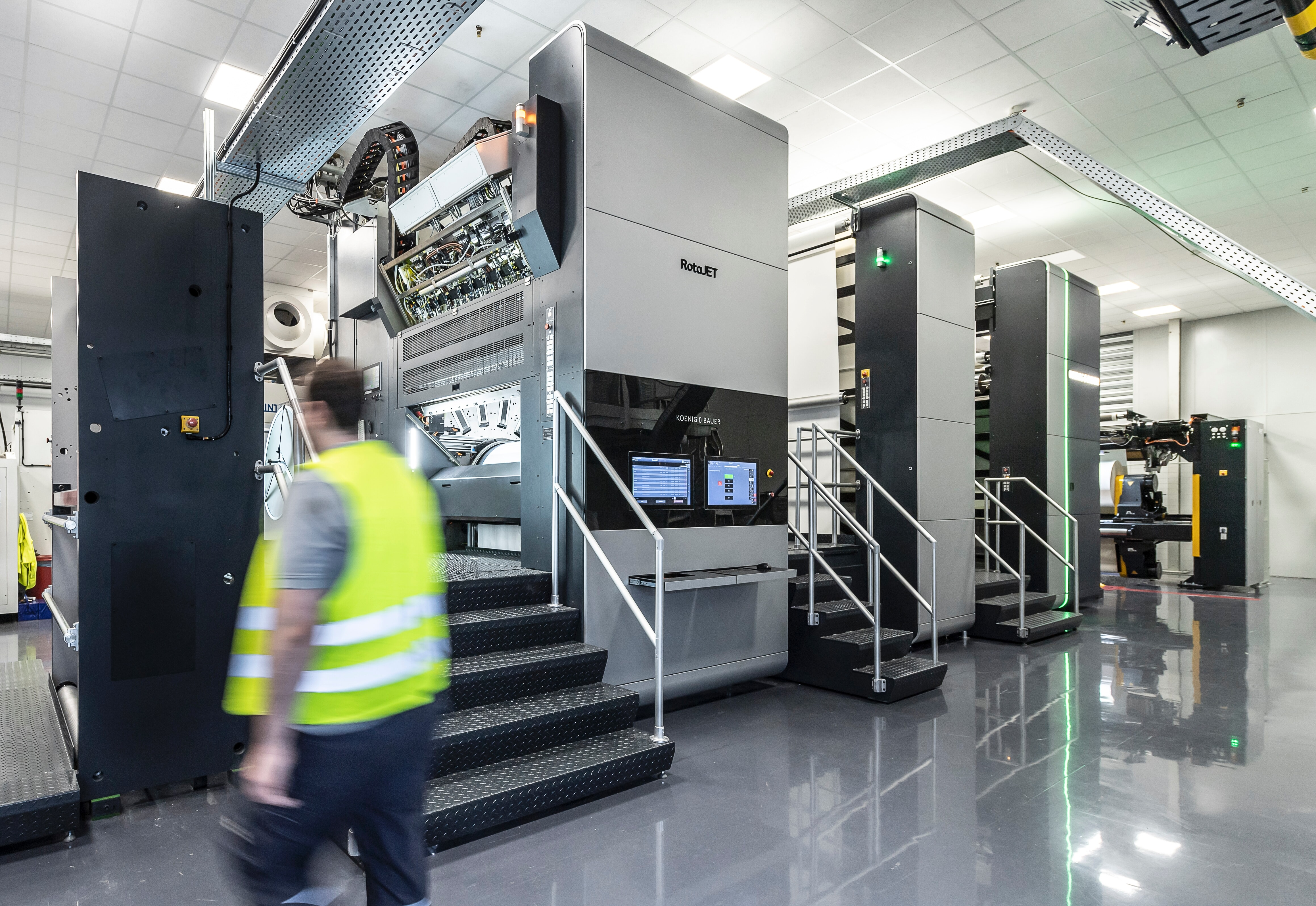 Industrielle Digitaldruckmaschine in Arnsberg